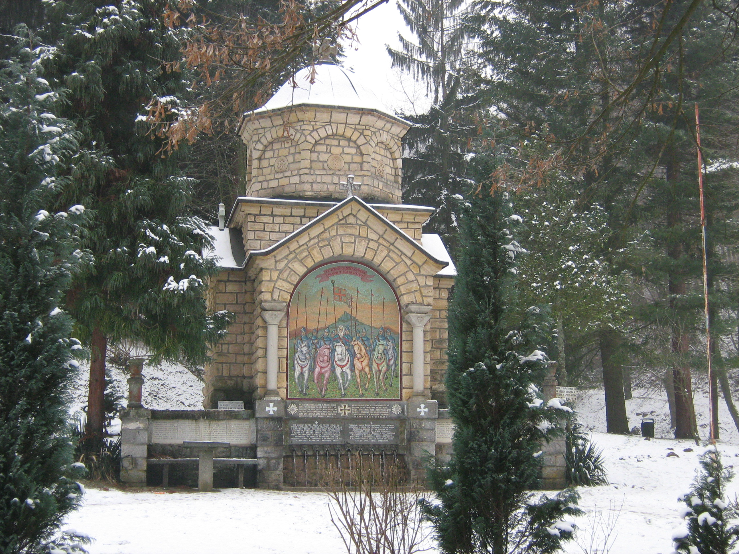 чесма Југовића код манастира